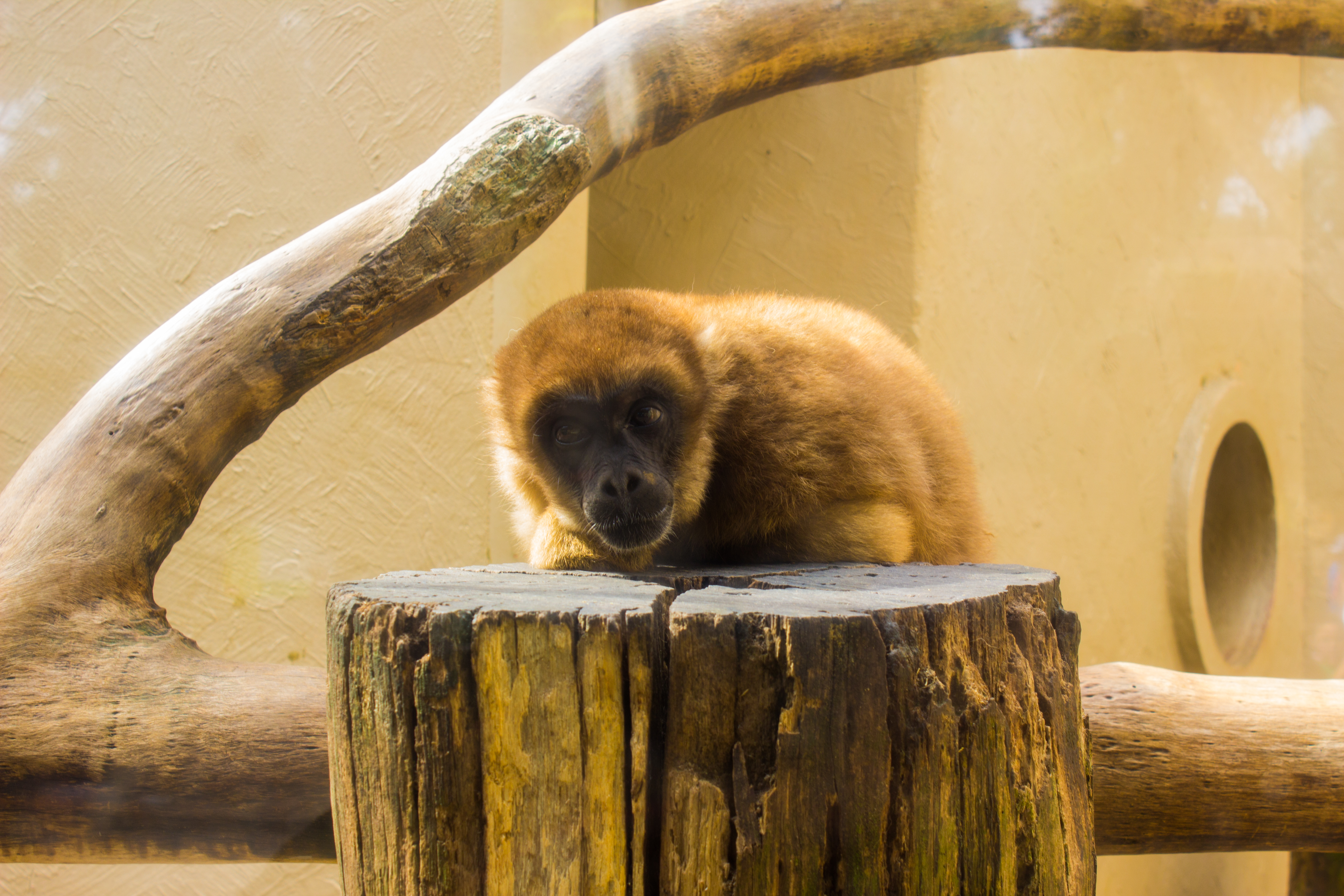 Muriqui do Sul repousa na sua jaula no Zoológico de São Paulo